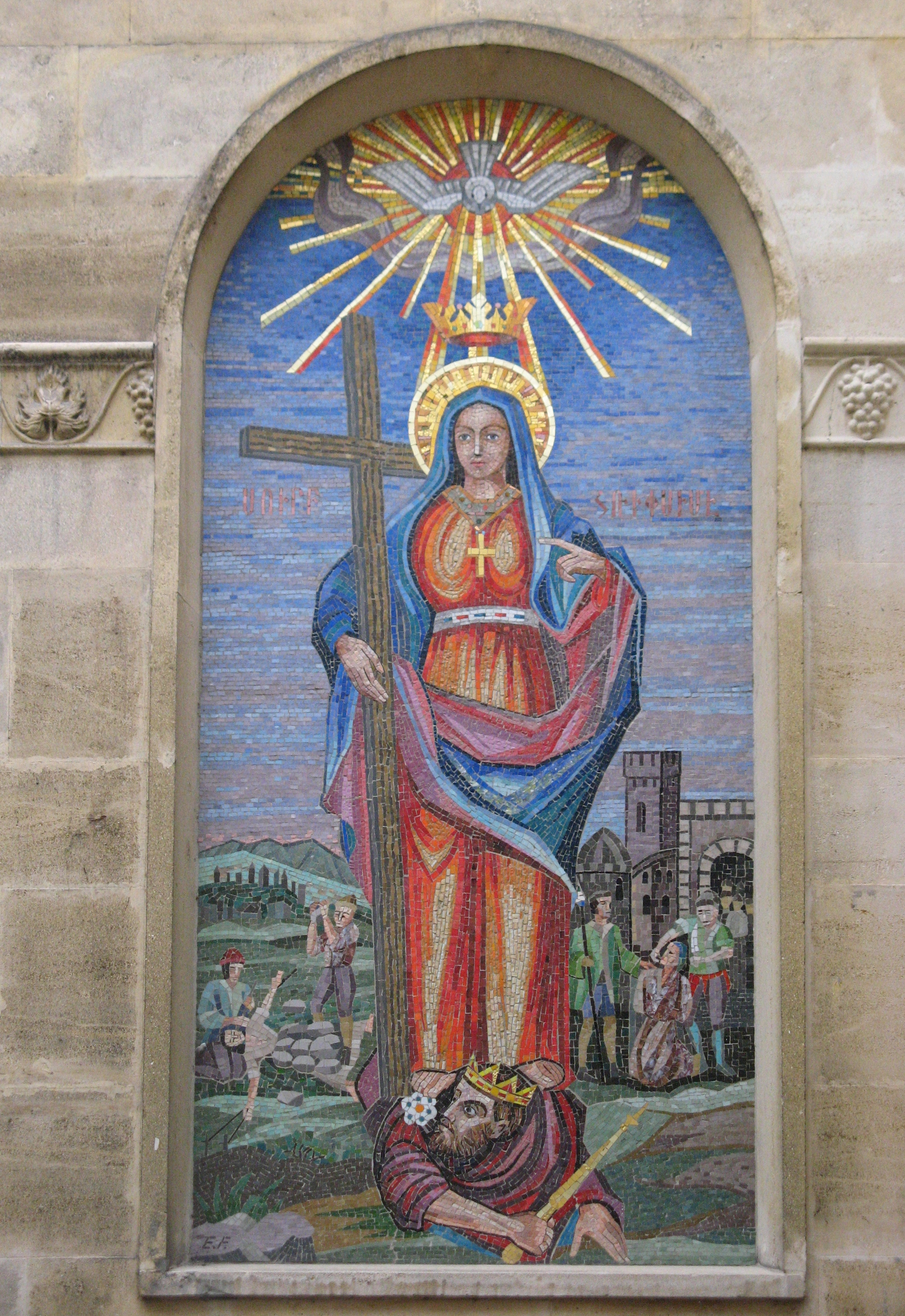 Heilige Hripsime, Mosaik, Armenische Kirche St. Hripsime, Kolonitzgasse 11, Wien-Landstraße